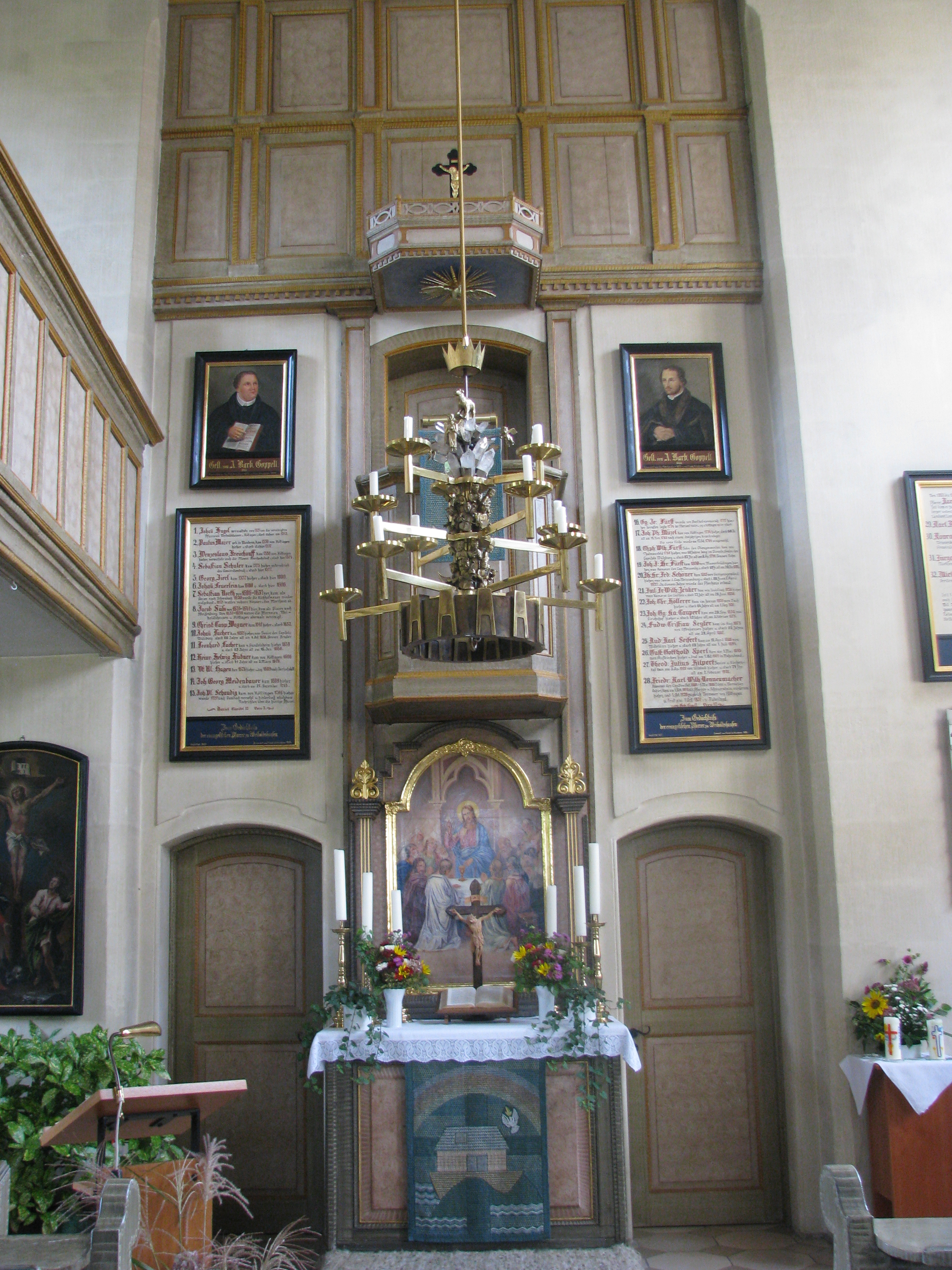 Weiboldshausen (Gemeinde Höttingen im Landkreis Weißenburg-Gunzenhausen), Kanzelaltar in der Nicolai-Kirche